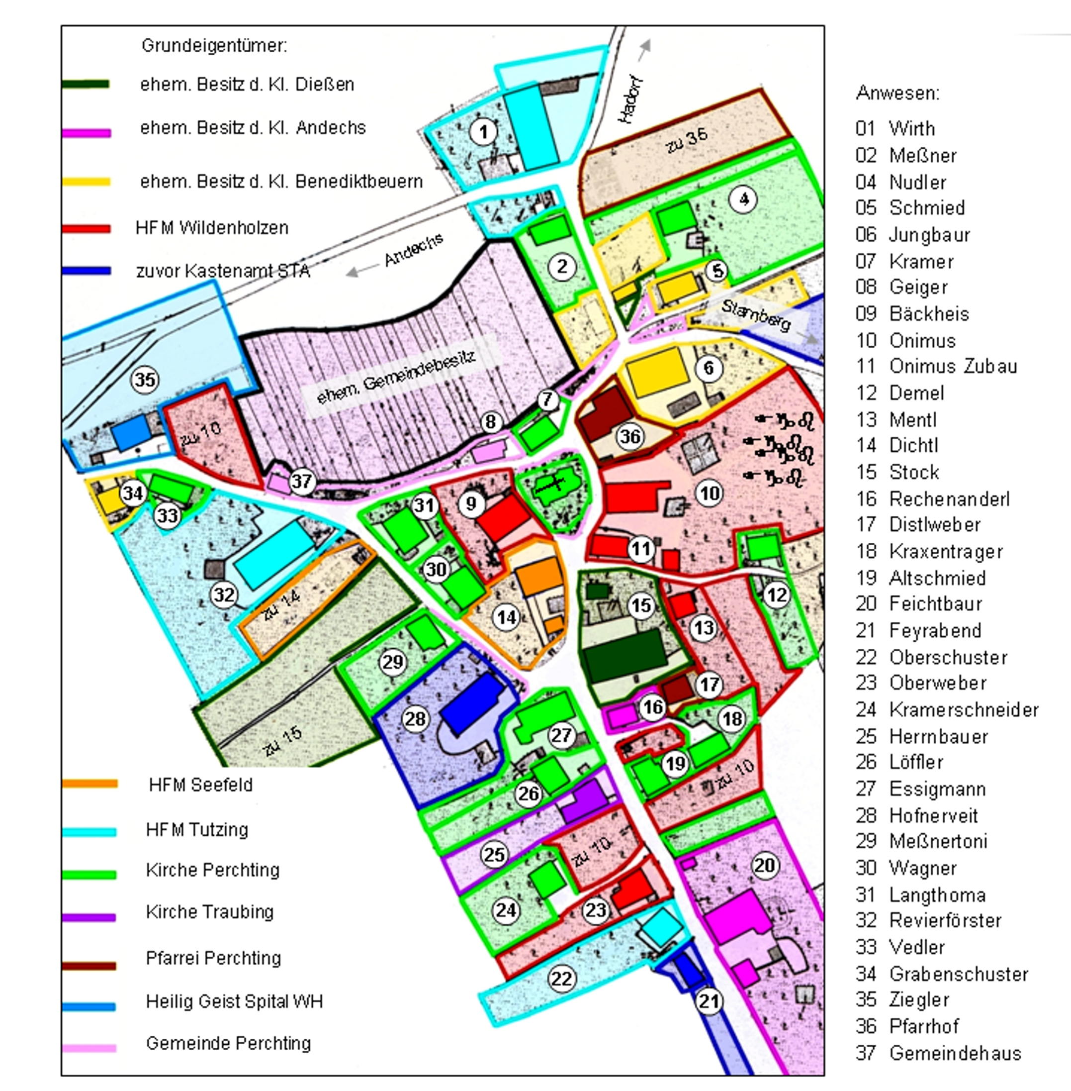 Die Anwesen des Pfarrdorfs Perchting nach dem Kataster von 1812. Die Farben der Parzellen sind denen der damaligen Grundeigentümer zugeordnet. Der ehemalige Besitz der aufgeführten drei Klöster fiel bereits 1803 im Zuge der Säkularisation an das Kurfürstentum Bayern. Der Grundbesitz der Hofmarken und der Kirchen ging 1848 in den Staatsbesitz über.